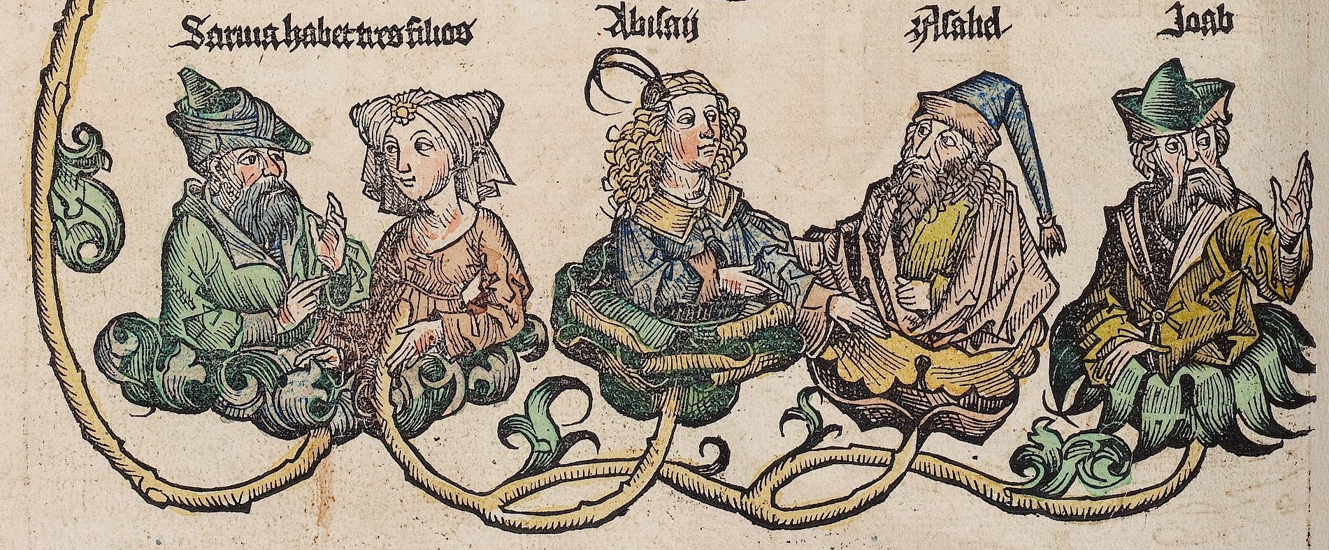 Ausschnitt aus einem kolorierten Holzschnitt mit der Darstellung der Familie Isais aus der Schedelschen Weltchronik, fol. 42v (Nürnberg 1493). Links ist Zeruja mit ihrem Mann zu sehen, daneben ihre drei Söhne Abischai, Asael und Joab.